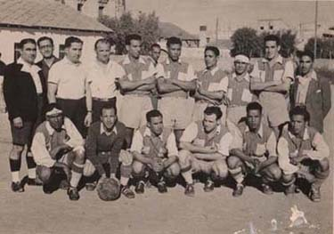 Équipe du Wydad de Casablanca en 1955